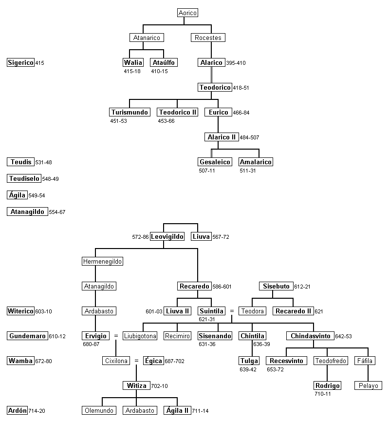 Árbol genealógico de los reyes visigodos